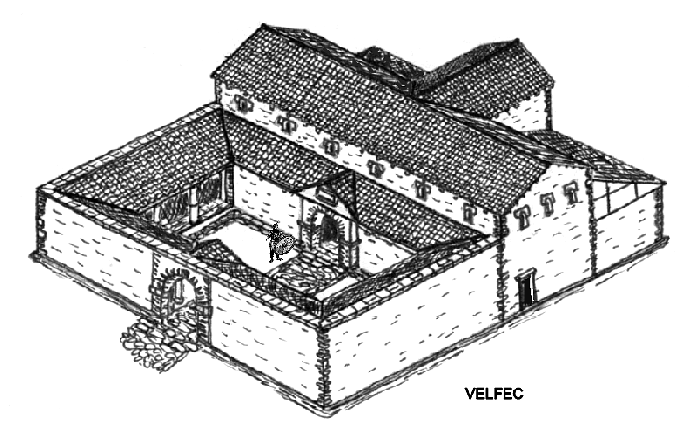 Lagerhauptquartier (principia) des Kastell Housesteads m Harianswall (GB), Zustand im 2. Jahrhundert n.Chr. Blick aus SO.